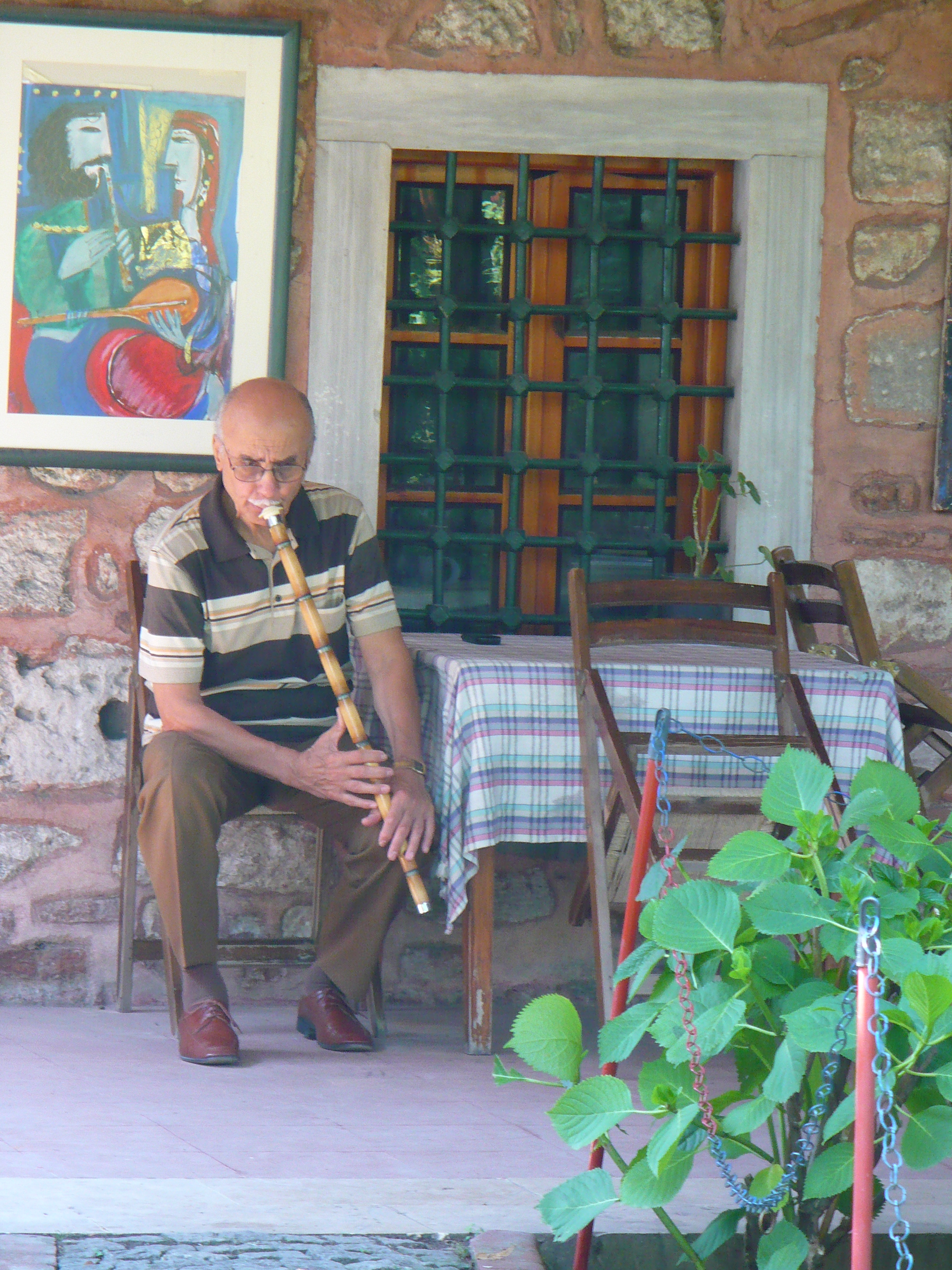 İstanbul'dan çeşitli görüntüler